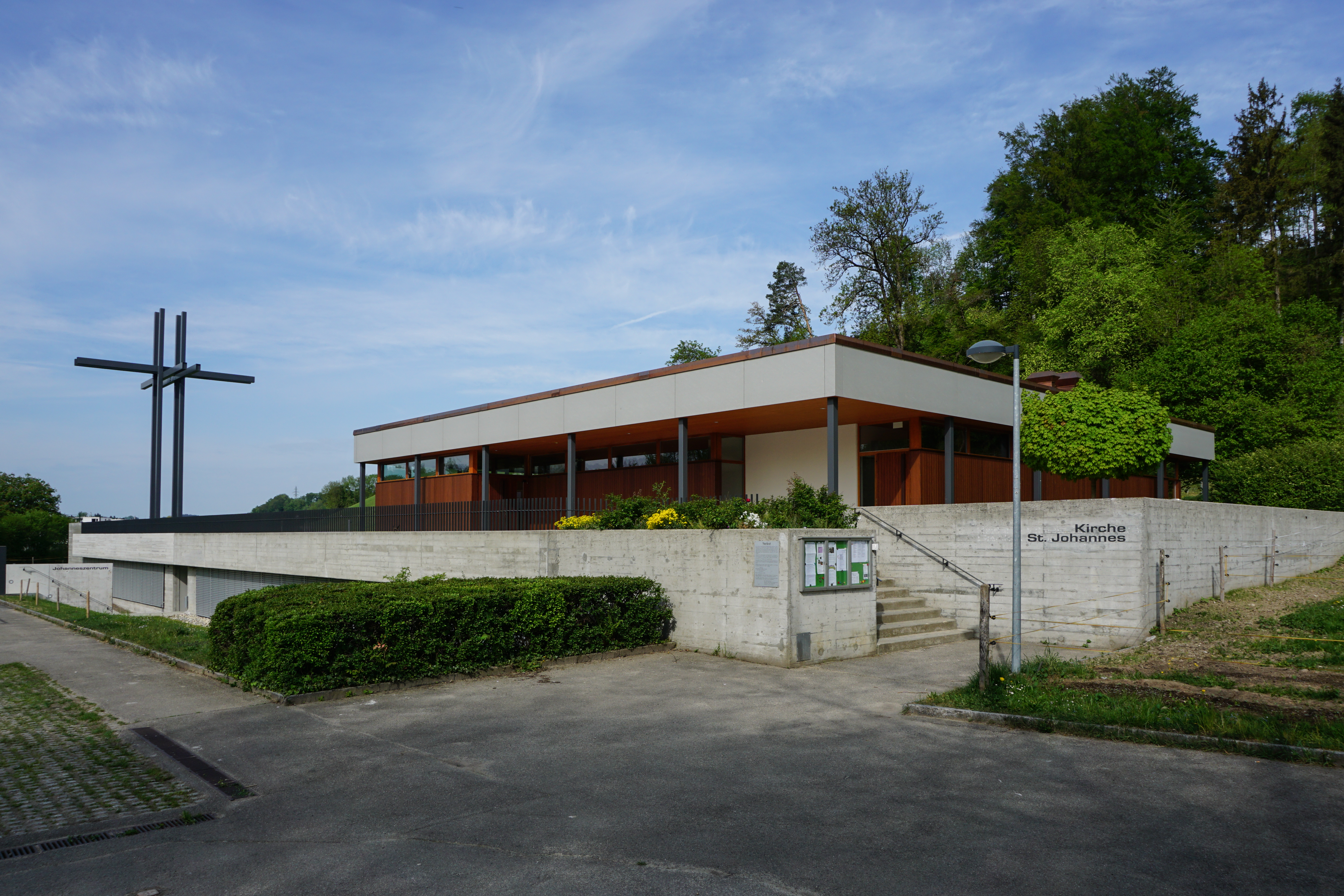 Übersicht der St.Johanneskirche mit Doppelkreuz